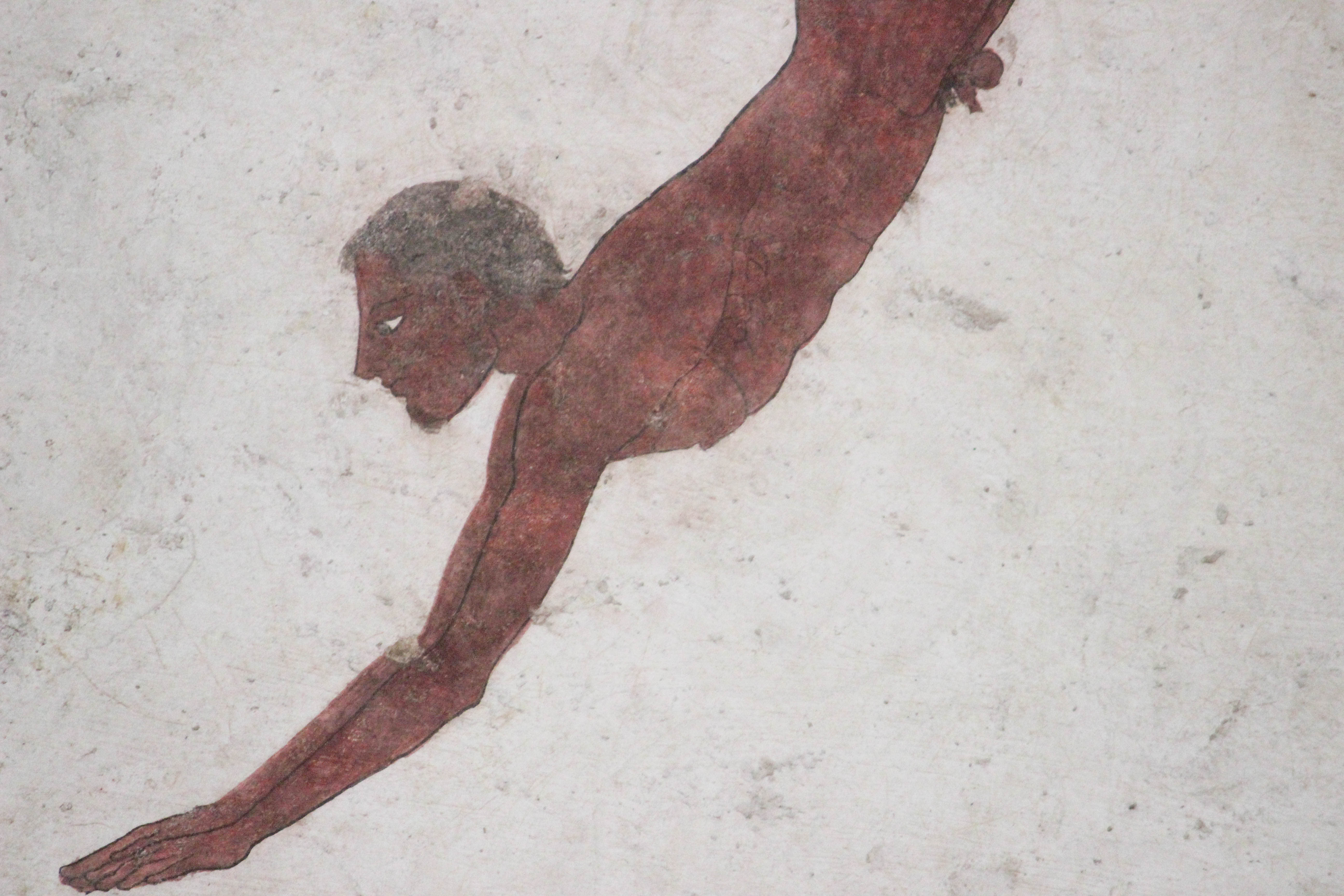 Paestum, Museo, pinturas de la tumba del nadador.